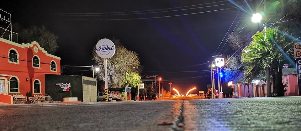 Entrada a Meoqui Chihuahua ( Conoce Meoqui )